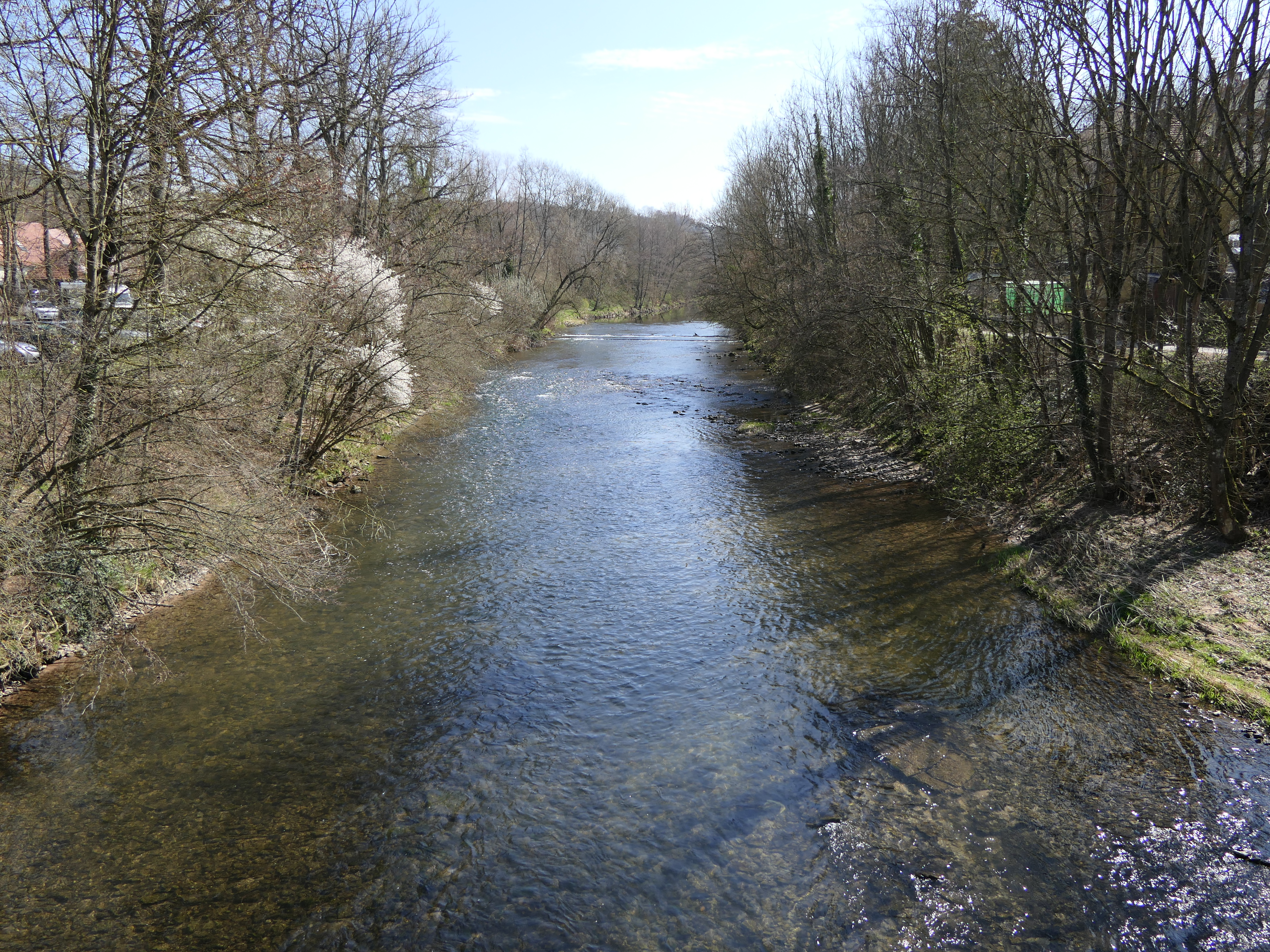 Blick auf die Murr von der Brücke in der Badtorstraße in Steinheim an der Murr (Baden-Württemberg).